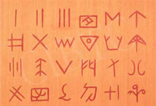 Listo de ideogramoj ĉizita en steleon de la ruino Erlitou, Ĉinio, dinastio Xia